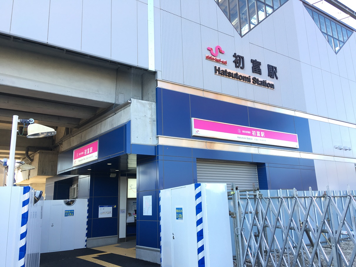 初富駅新駅舎